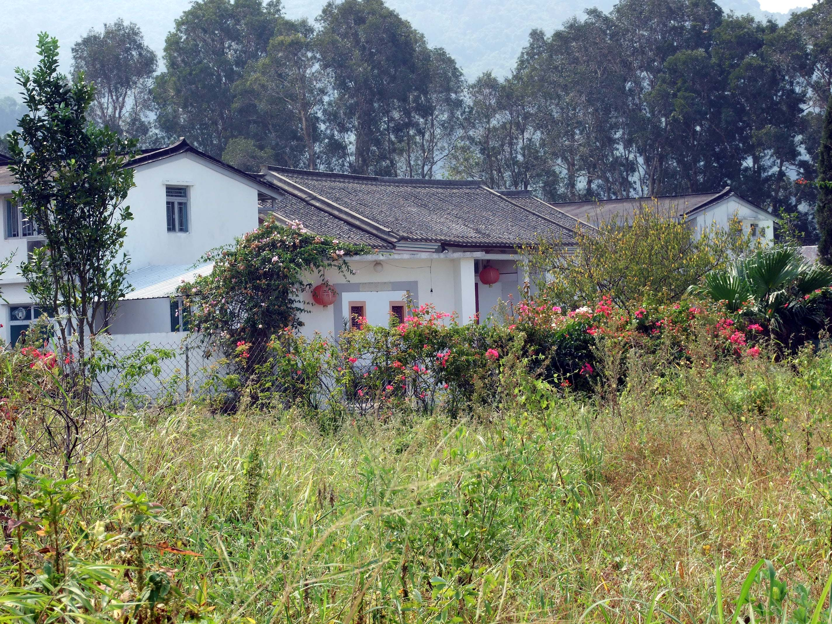 中文（香港）: 元朗八鄉水盞田嶺梅莊